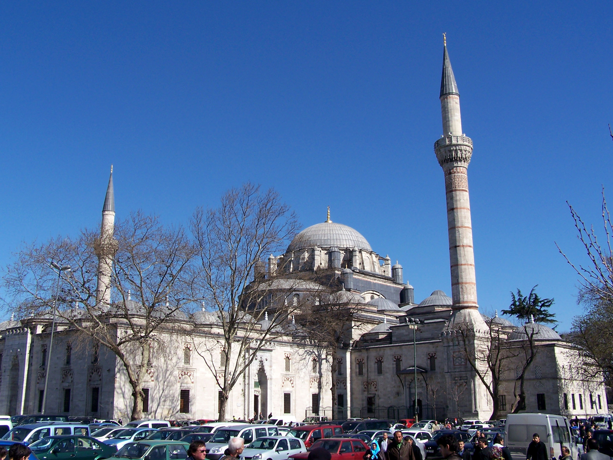 Sultan II. Beyazıt Camii in Fatih, İstanbul, Turkey